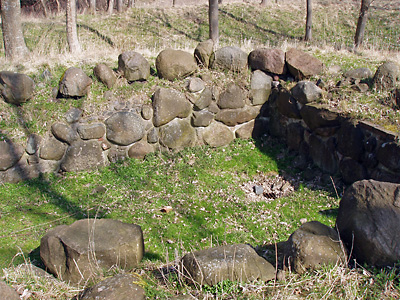 Bjørnkær Voldsted (Gosmer Sogn, Hads Herred, Århus Amt, Denmark) Tårnfundamentet med brønden. image by me user:Nico-dk /Nils Jepsen